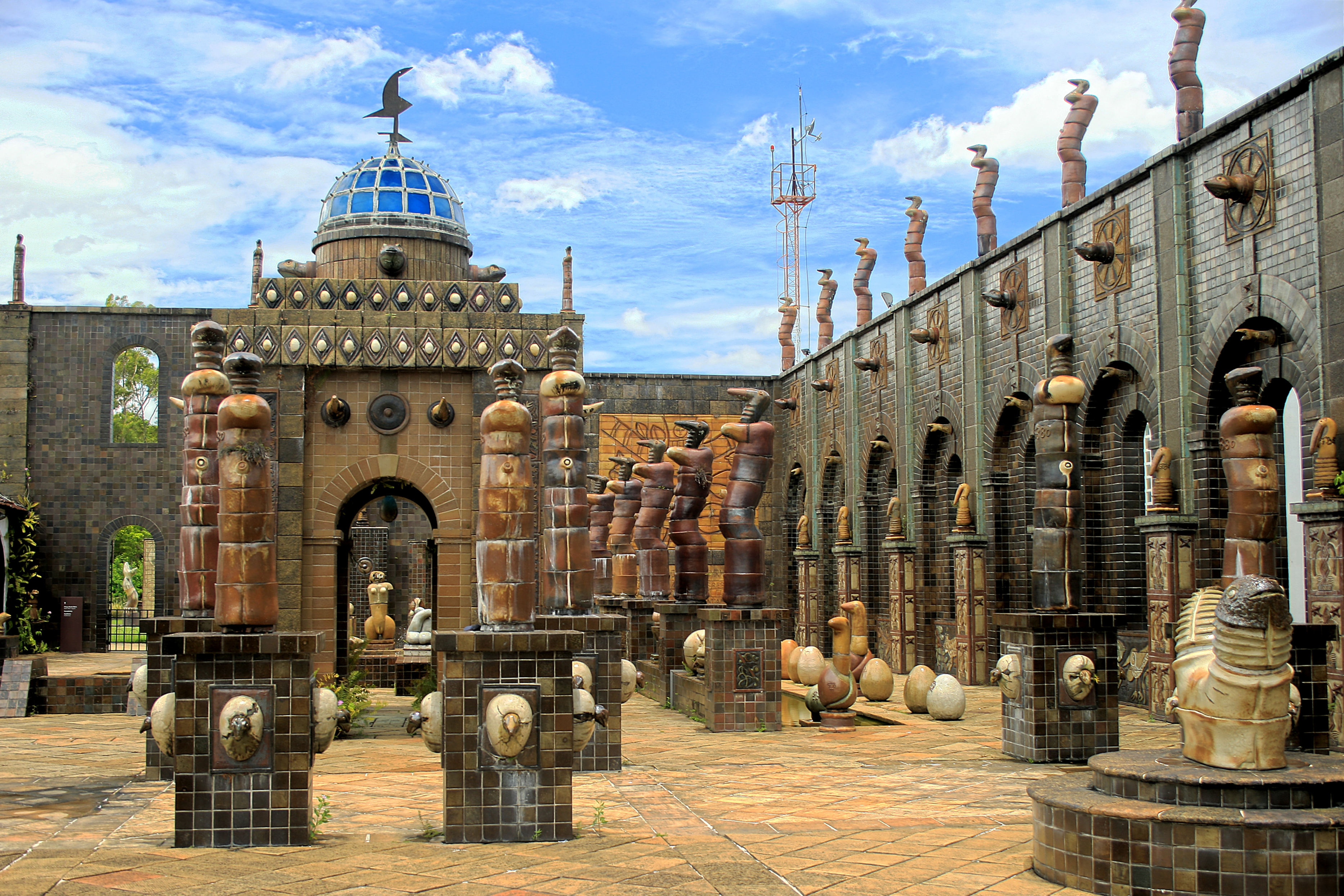 Oficina de Cerâmica Francisco Brennand - Recife, Pernambuco, Brasil.